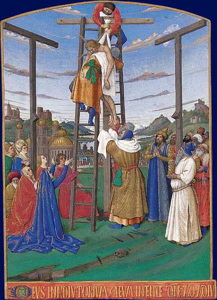 Deux hommes montés sur deux échelles posées contre la croix, dont l'une est tenue par saint Jean, font descendre le corps du Christ recueilli dans un linceul par Joseph d'Arimathie et derrière lui Nicodème avec un vase pour l'embaumement. Le instruments de la Passion sont à leurs pieds. La Vierge agenouillée, tient ses mains tendues vers le Christ. Le paysage montagneux en arrière plan contient une ville avec une église à bulbe évoquant Jérusalem.